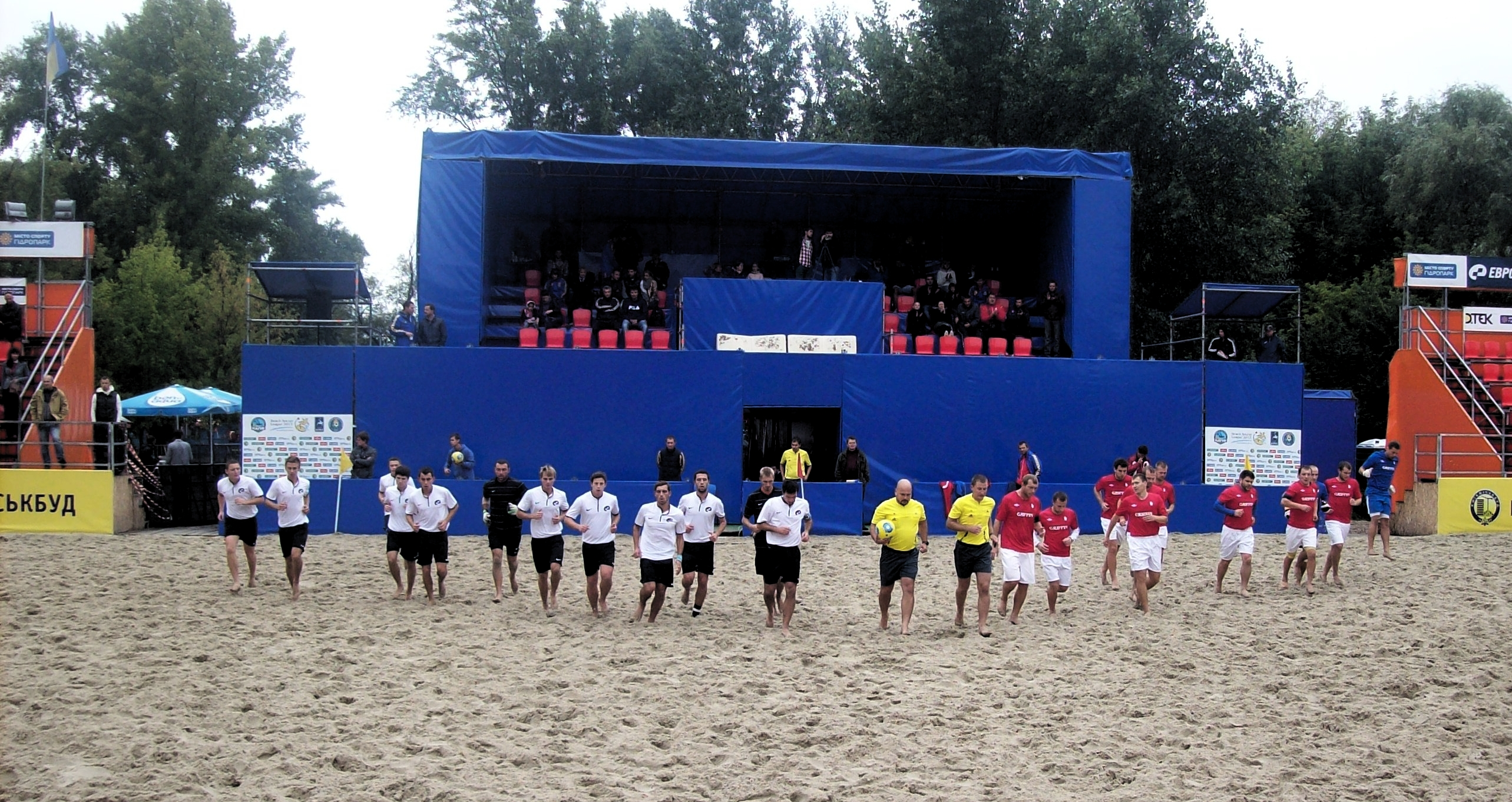 Півфінал українського чемпіонату з пляжного футболу. на поле виходять гравці київських команд Євроформат (біло-чорна форма) і Гріффін (червоно-біла форма)